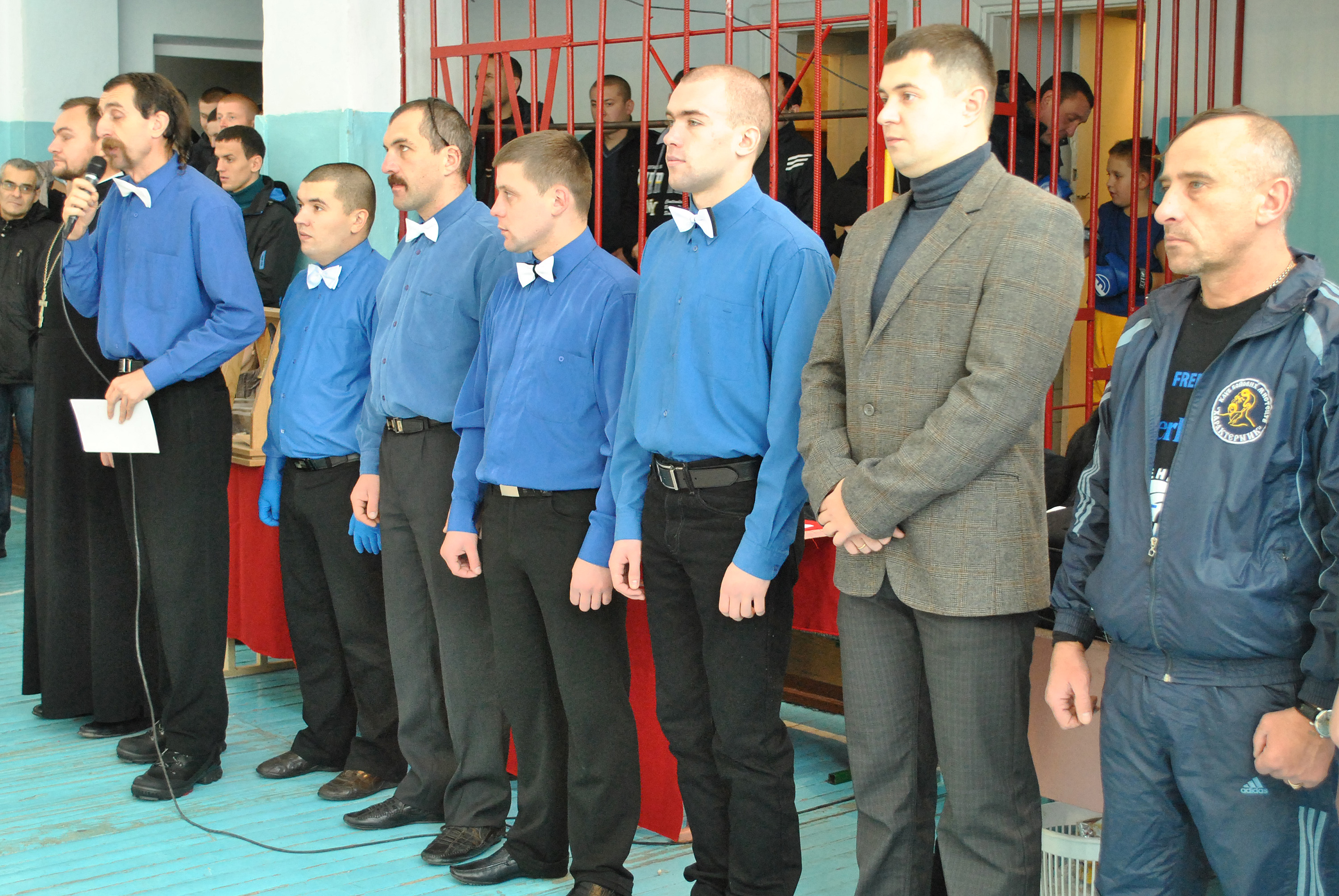 Члени спортивного клубу «Характерник» (Тернопіль) і судді змагань із фрі-файту в Тернополі у грудні 2012 року. Зліва з мікрофоном Валерій Чоботарь.